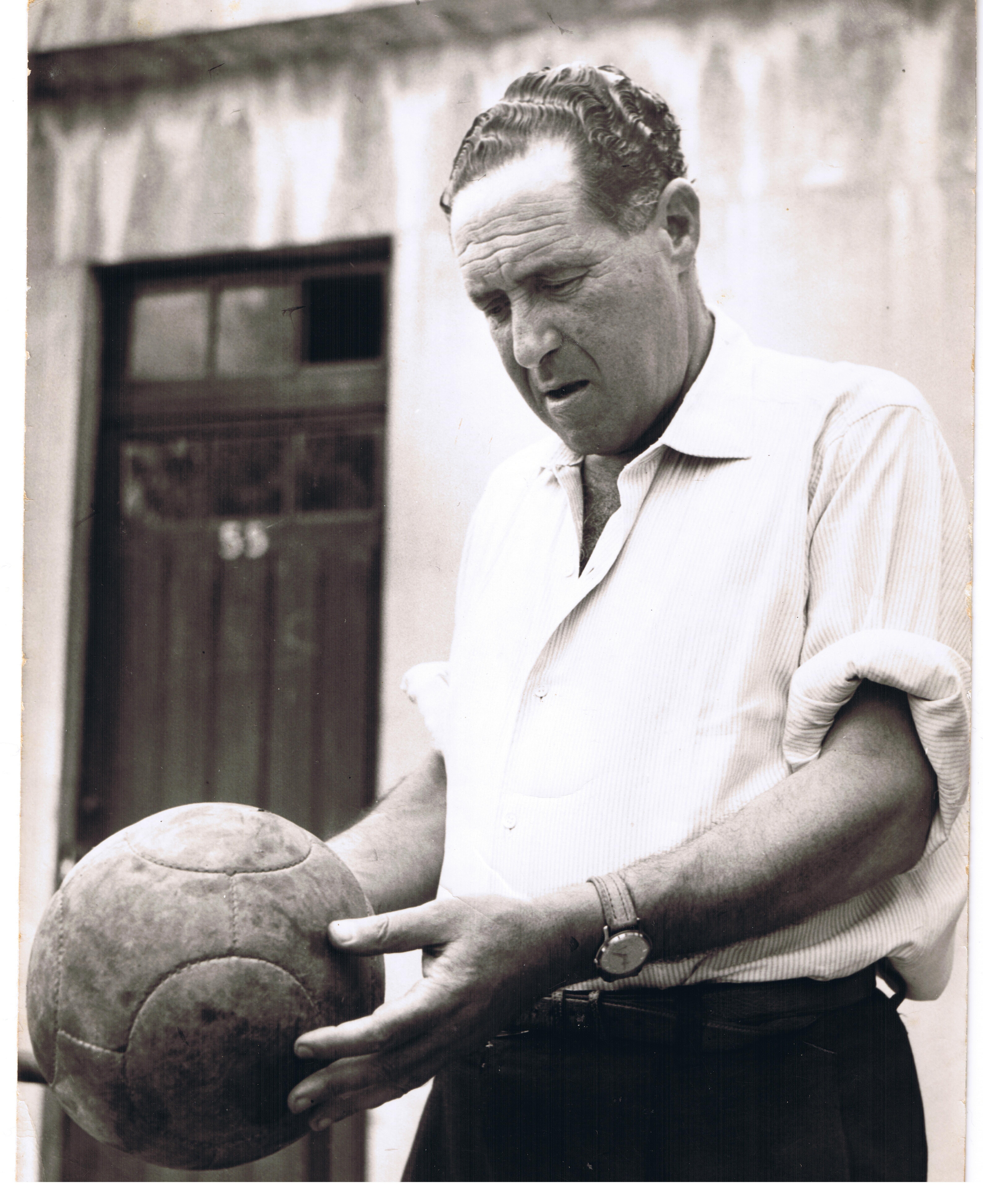 Santiago Urtizberea